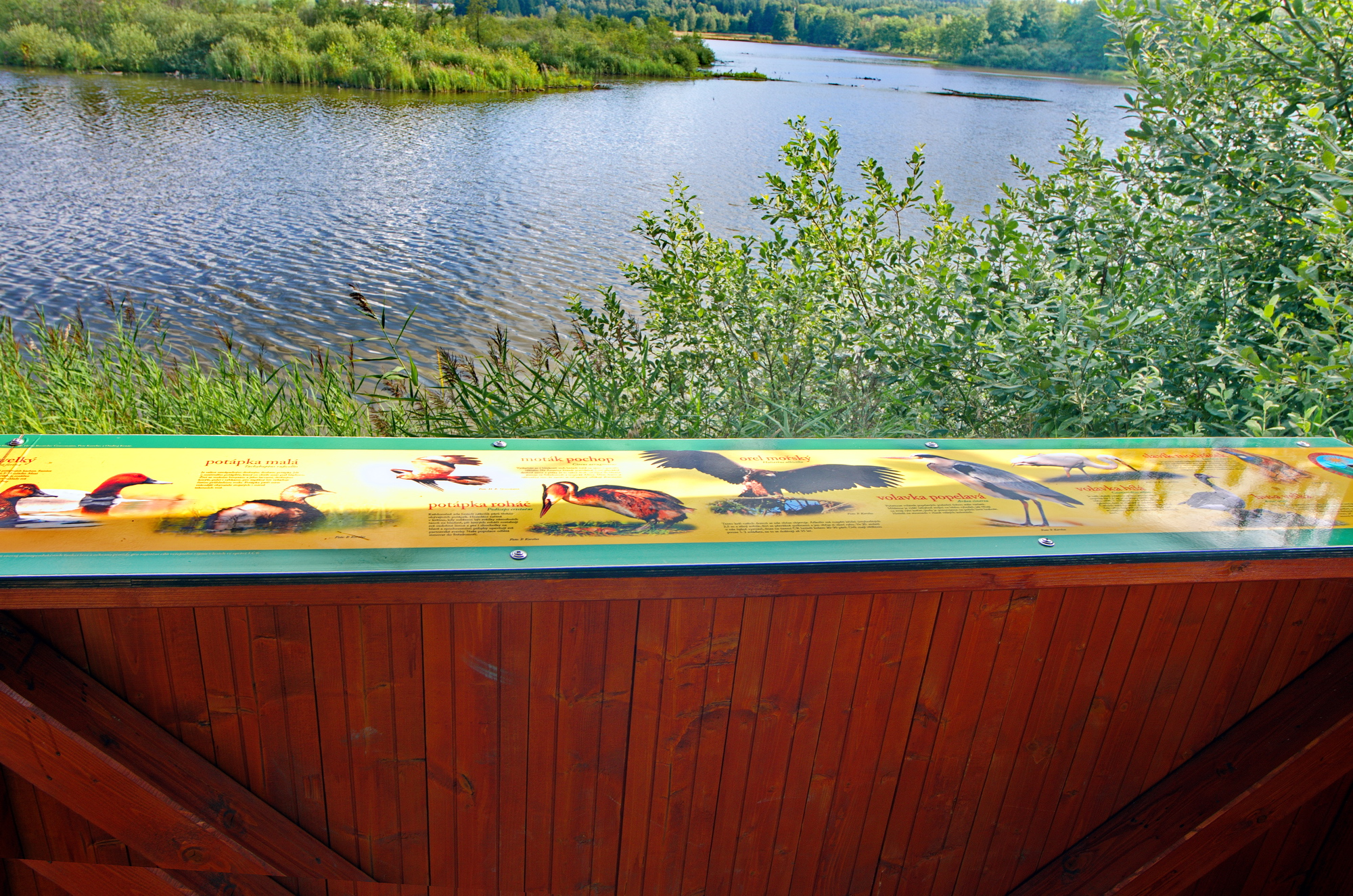 Přírodní rezervace Amerika, pozorovatelna ptactva